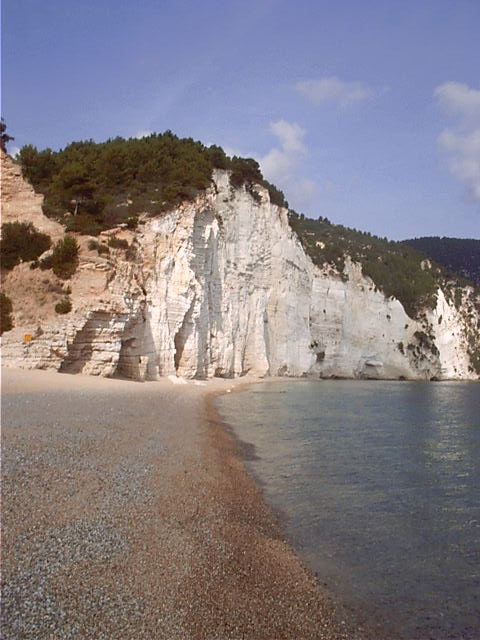 Una veduta della baia di Vignanotica e delle sue falesie, a Mattinata (Foggia), nel mese di novembre 2005.